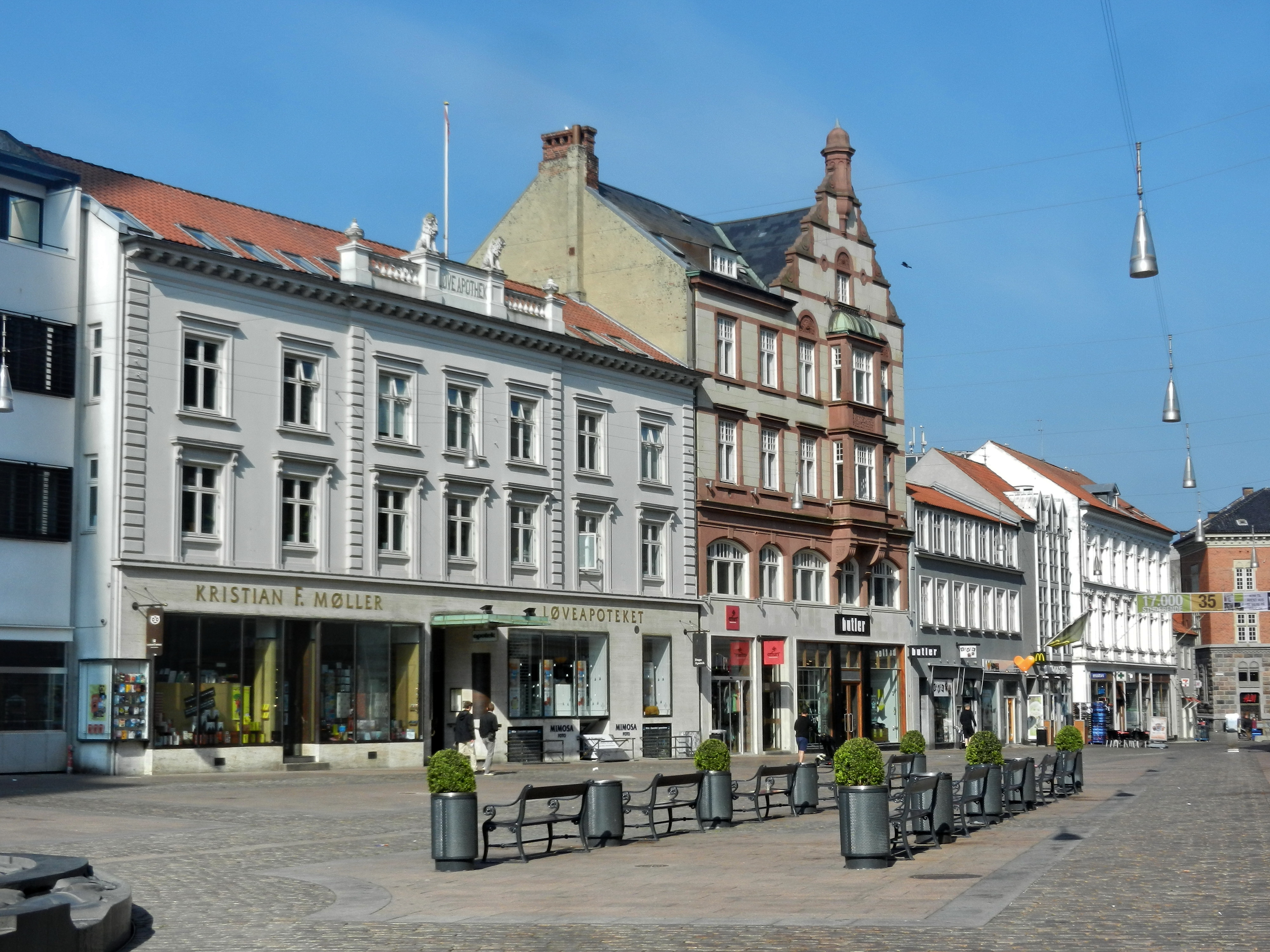 Aarhus